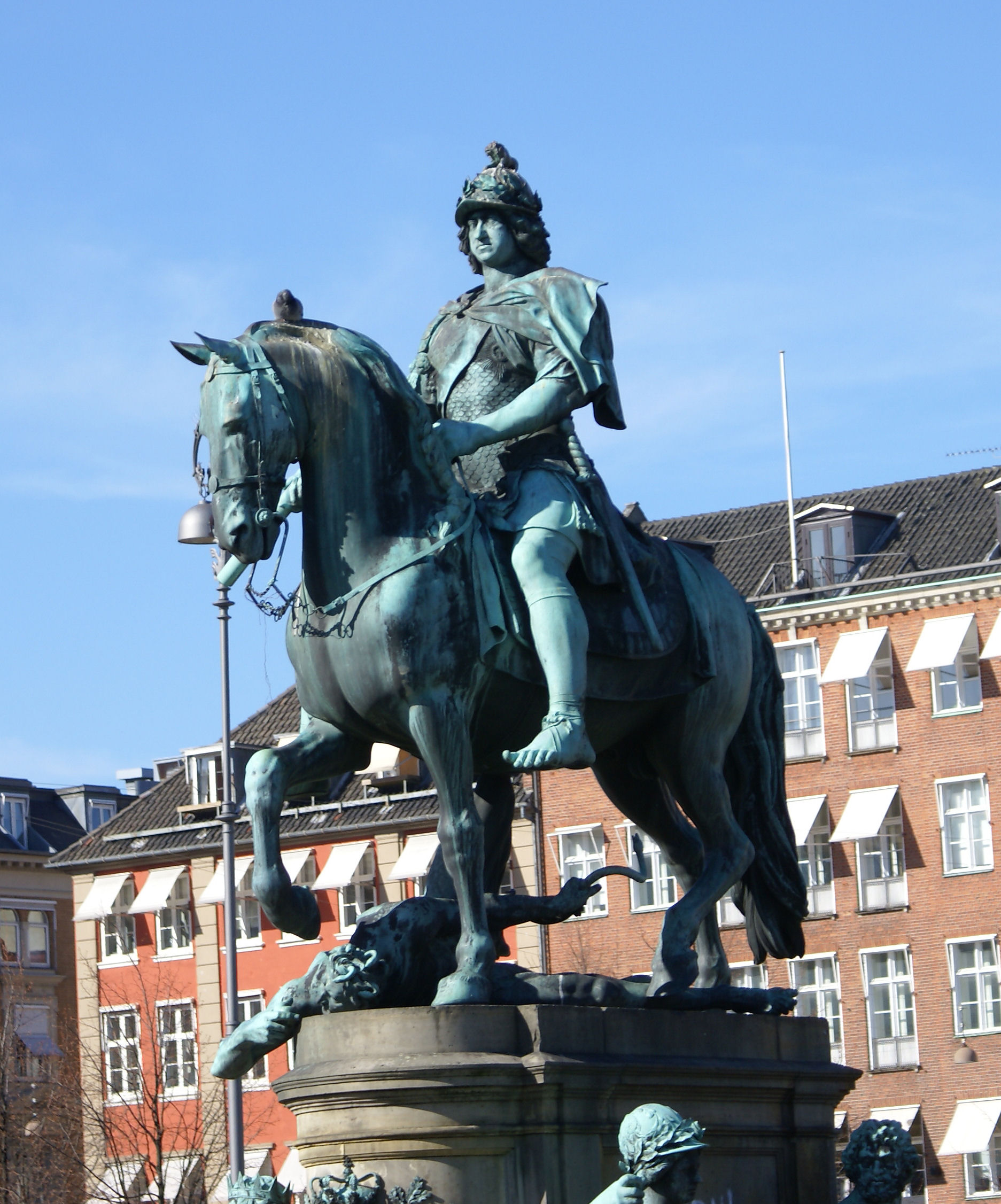 Christian V, statue på Kongens Nytorv